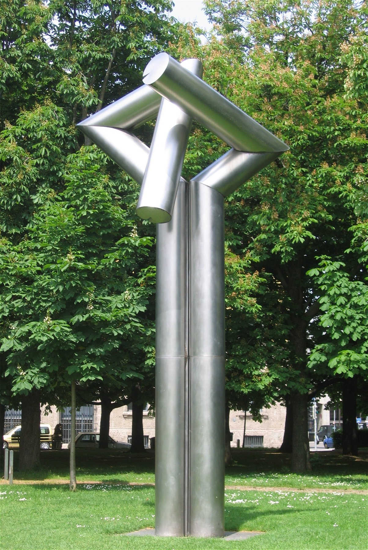 Erich Hauser: Doppelsäule 23/70, 1970, Edelstahl, zwischen der Neuen und Alten Pinakothek in München